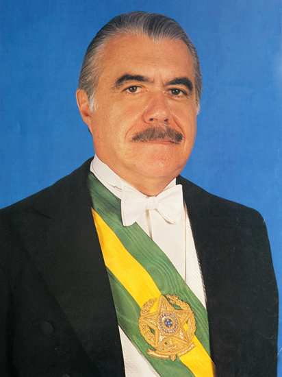 Foto Oficial presidente José Sarney.